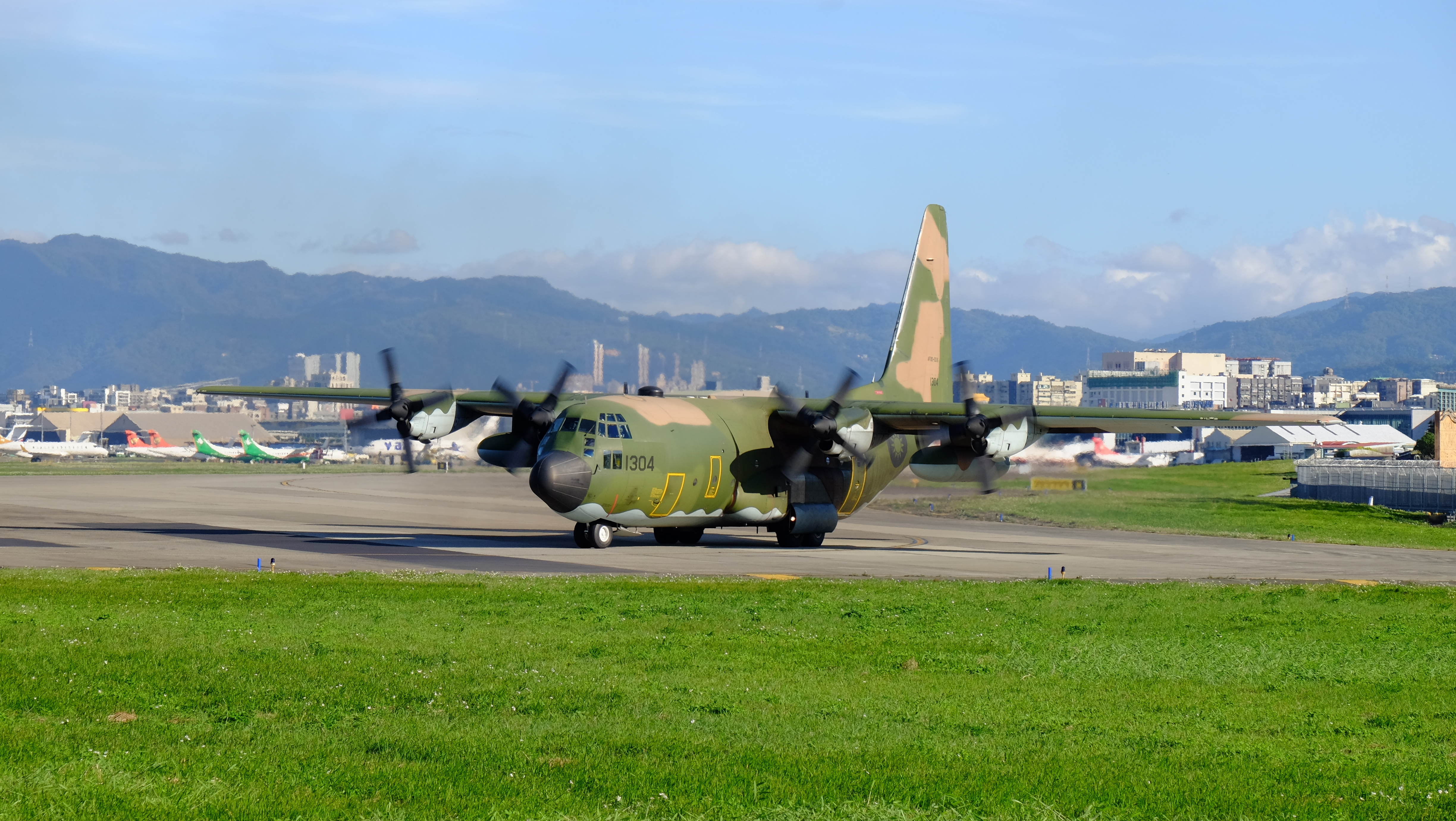 接近空軍松山基地跑道西端的中華民國空軍C-130H 1304。